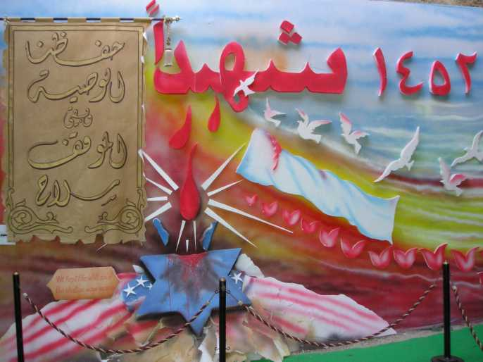 Antyamerykańska i antyizraelska propaganda Hezbollahu ("Wystawa libańskiego oporu", Baalbek, Liban, 2005 r.). Autor: Aotearoa